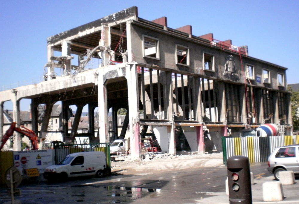 Restructuration des Halles de Chambéry (Savoie, Rhône-Alpes, France).